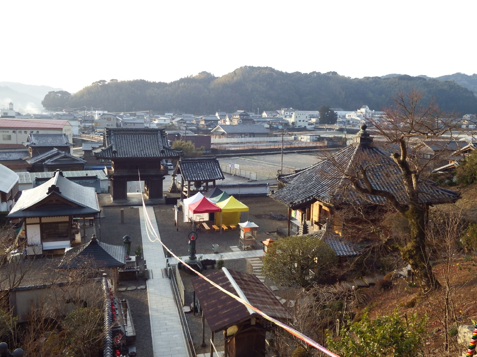 平等寺の境内